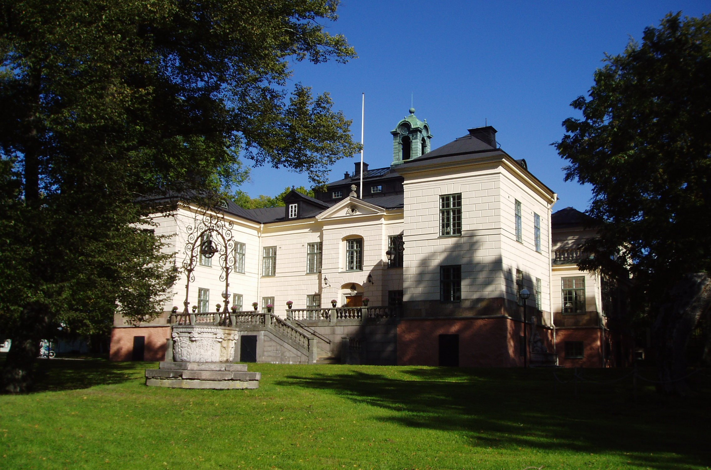 Näsby slott, Täby kommun